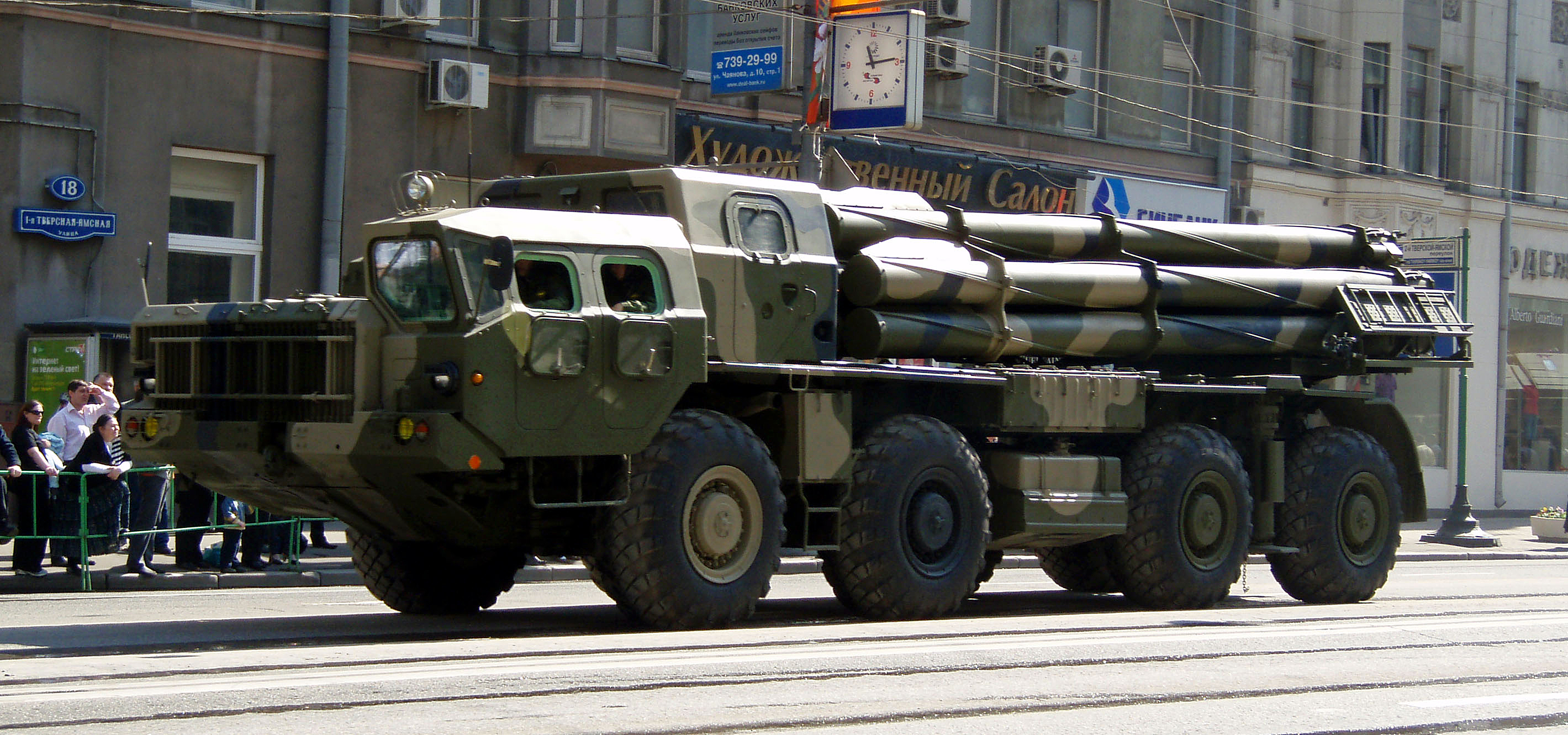 РСЗО Смерч на репетиции Парада Победы 2008 года